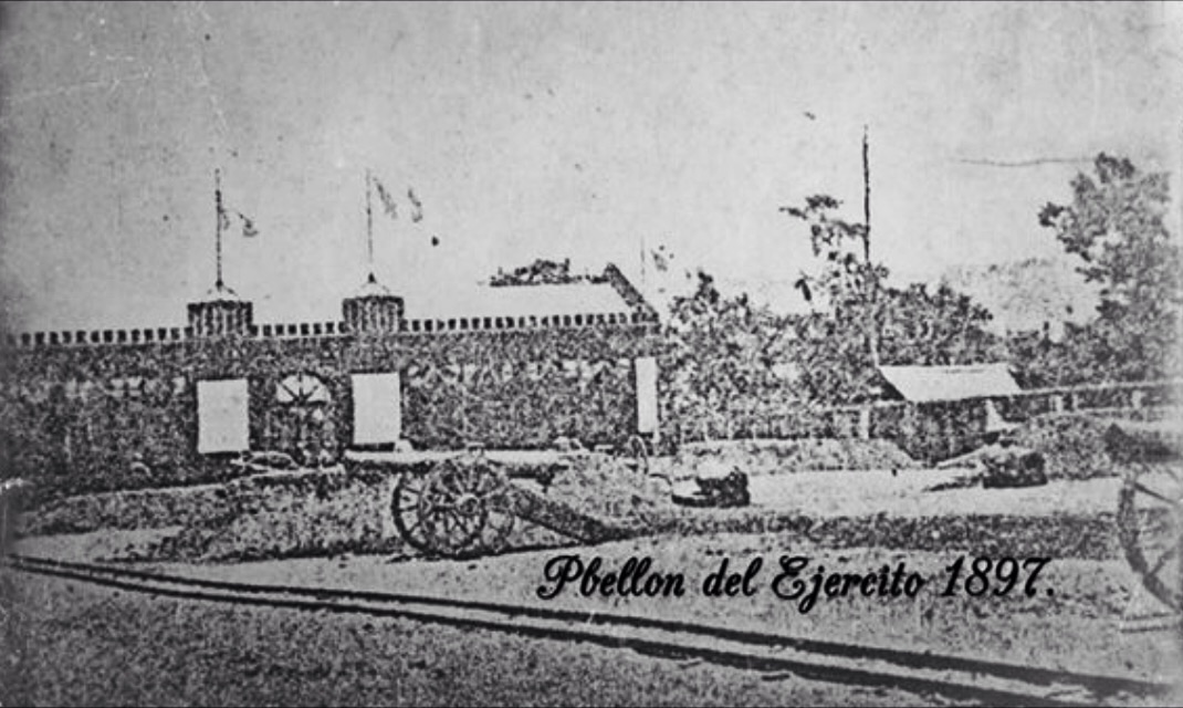 Exposición centroamericana de 1897.